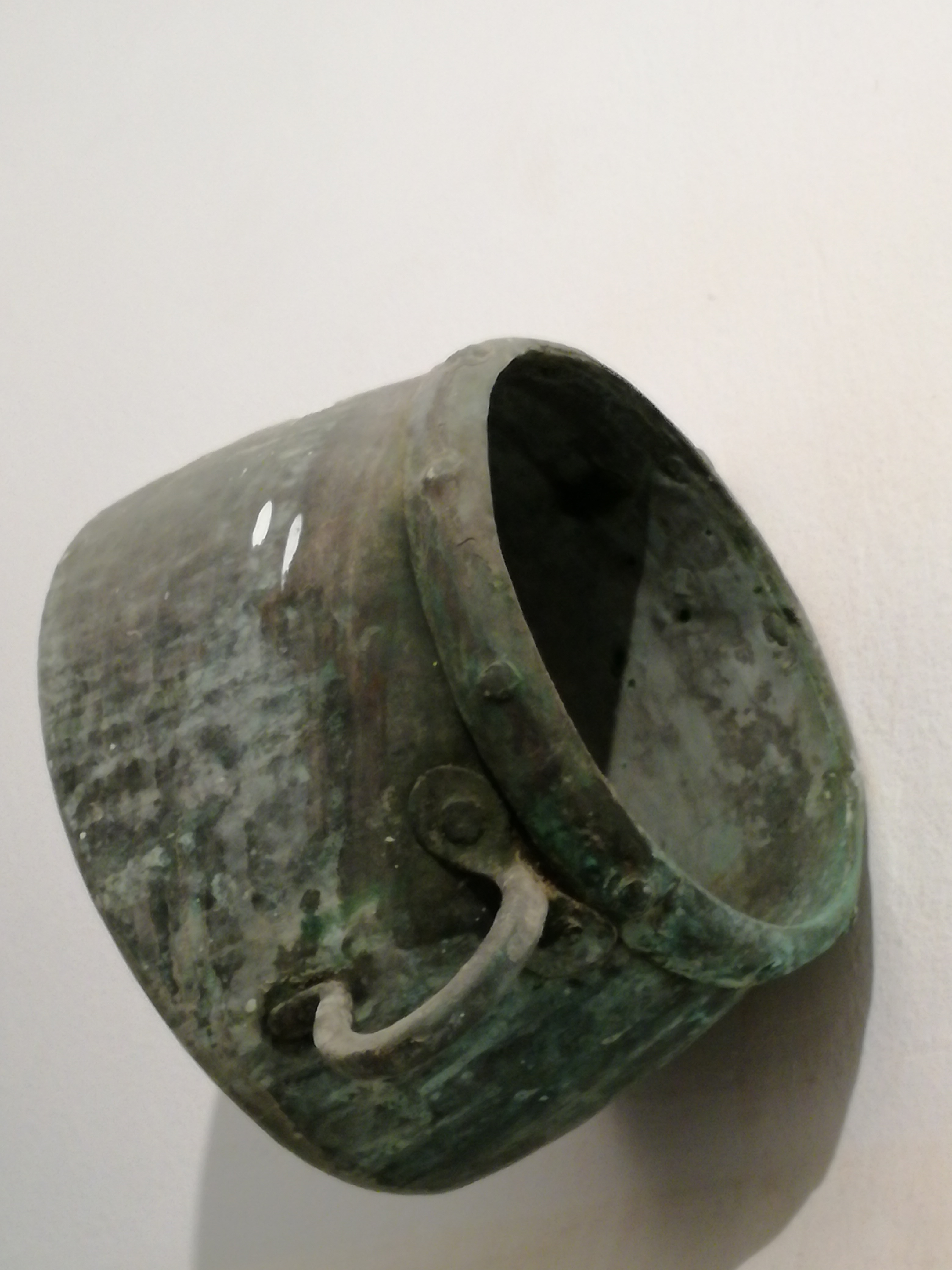 Couscoussier en cuivre